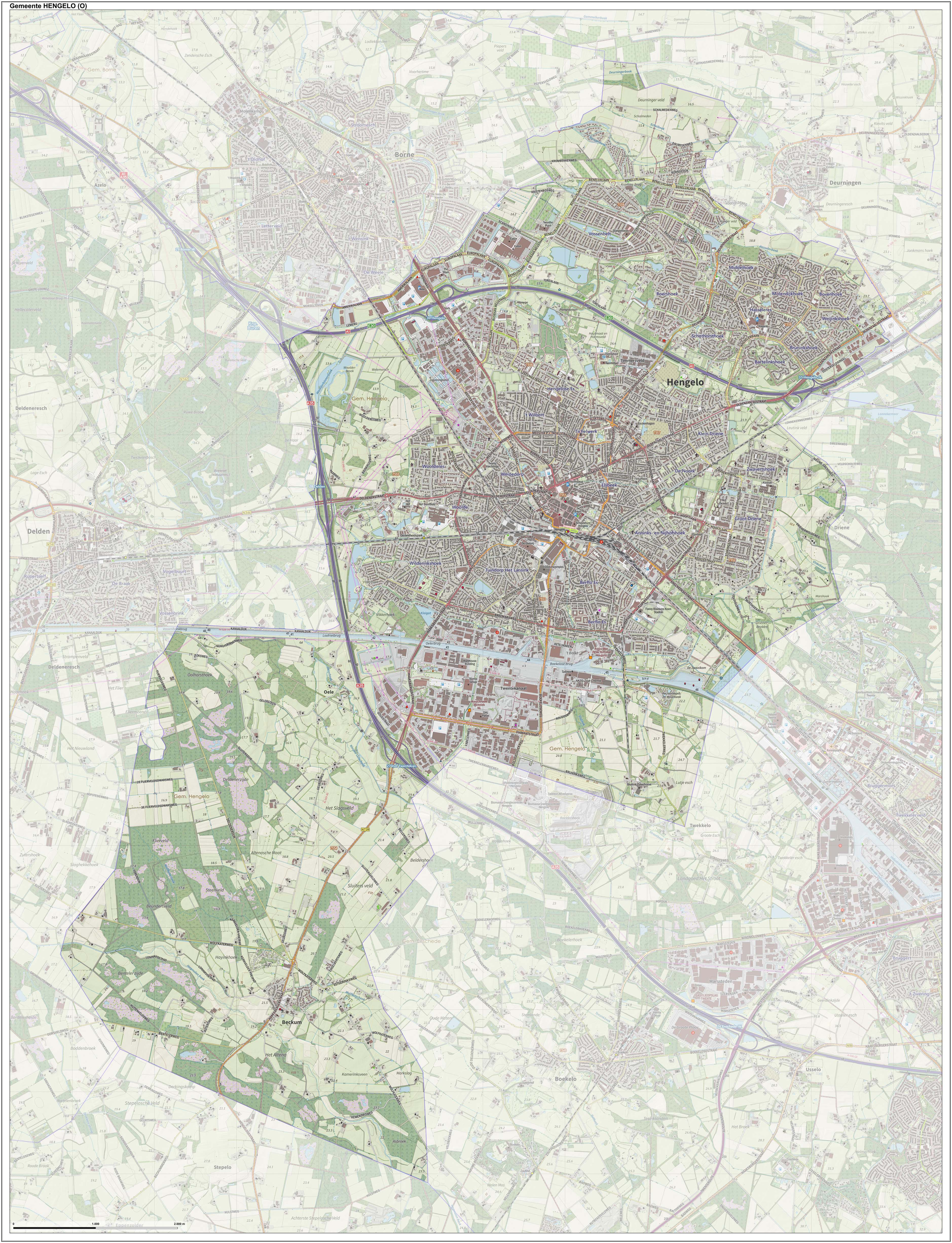 Topografische gemeentekaart. Resolutie: 400 pixels/km. Kaartbeeld samengesteld uit de open geodata van de Top10NL en Top25namen (Kadaster), Creative Commons-BY licentie. Gebouwvlakken uit open geodata BAG extract. Wegen uit de OpenStreetMap, OpenStreetMap community. Reliëfschaduw uit de Actuele Hoogtekaart AHN2. Samenstelling en kleurenschema: Jan-Willem van Aalst, met QGIS. Zie ook de Legenda.